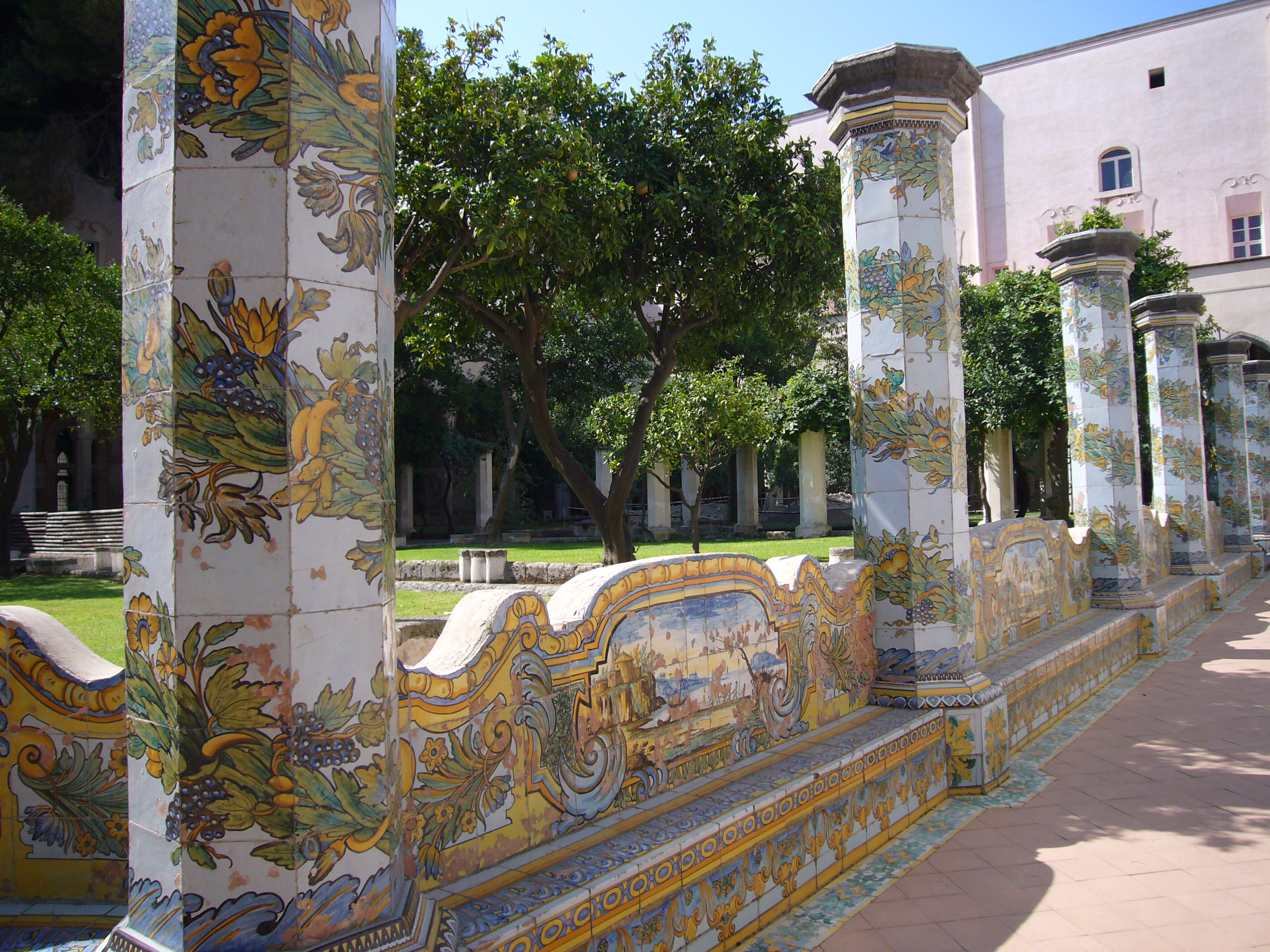 Napoli, chiostro di Santa Chiara: maioliche